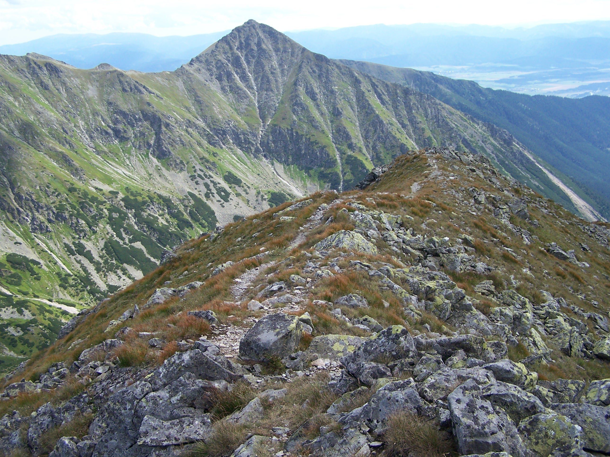 Mała Bystra (Tatra Mountains, Bystra)